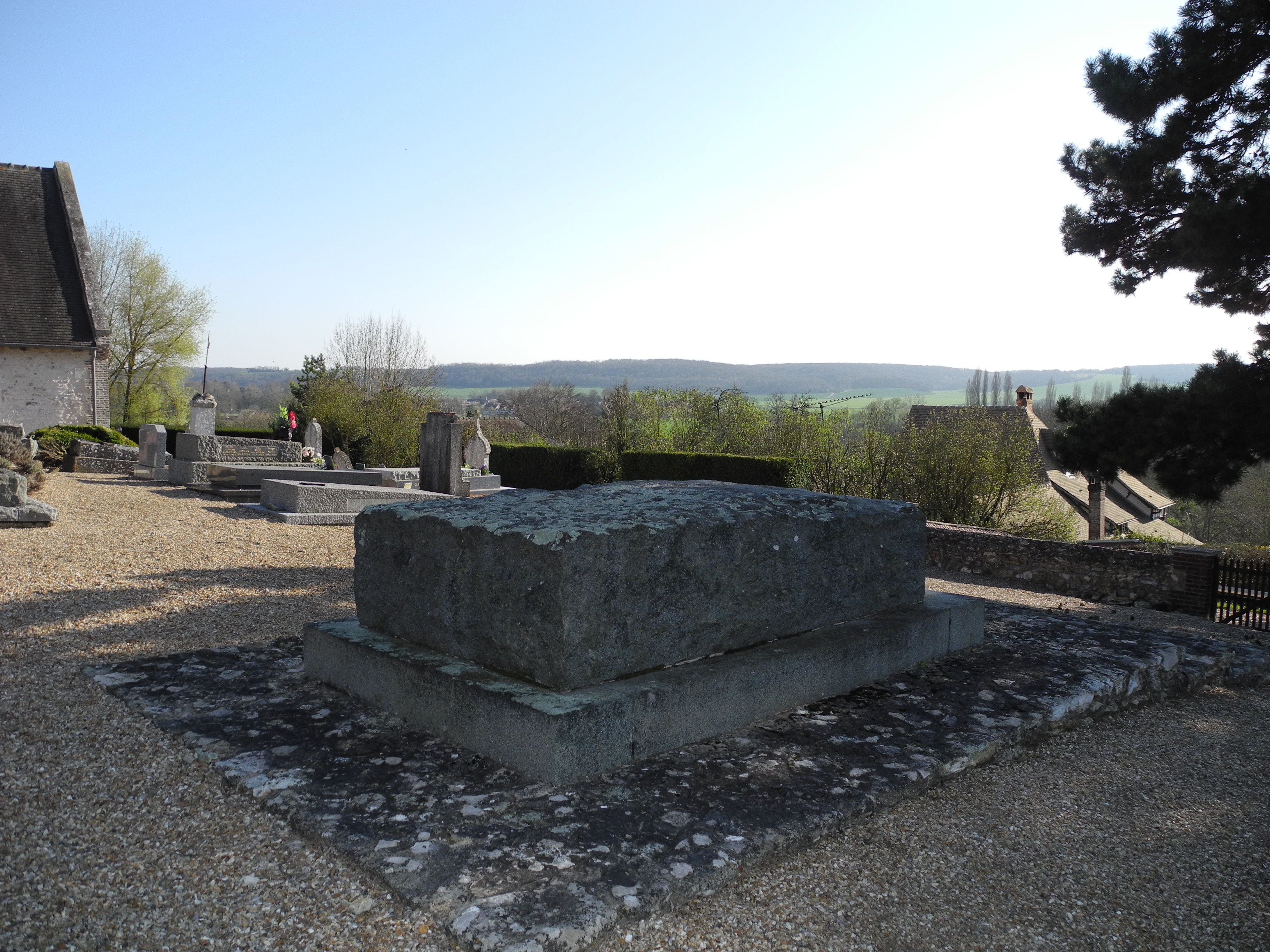 Le tombeau d'Aristide Briand dans le cimetière de Cocherel.